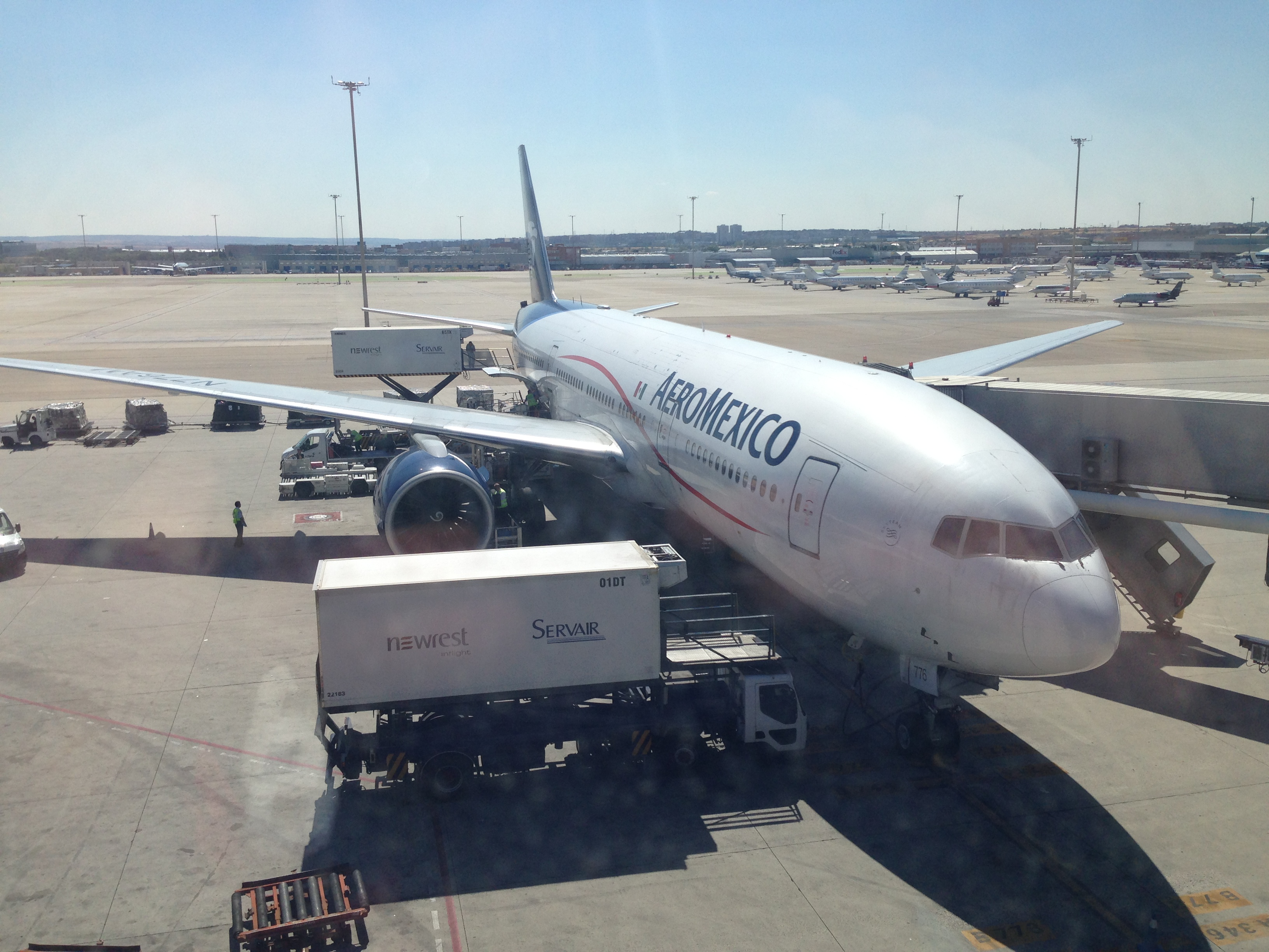 B777 de Aeroméxico en Madrid Barajas.